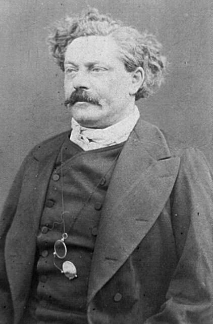 Frédéric Cournet (1839-1885)